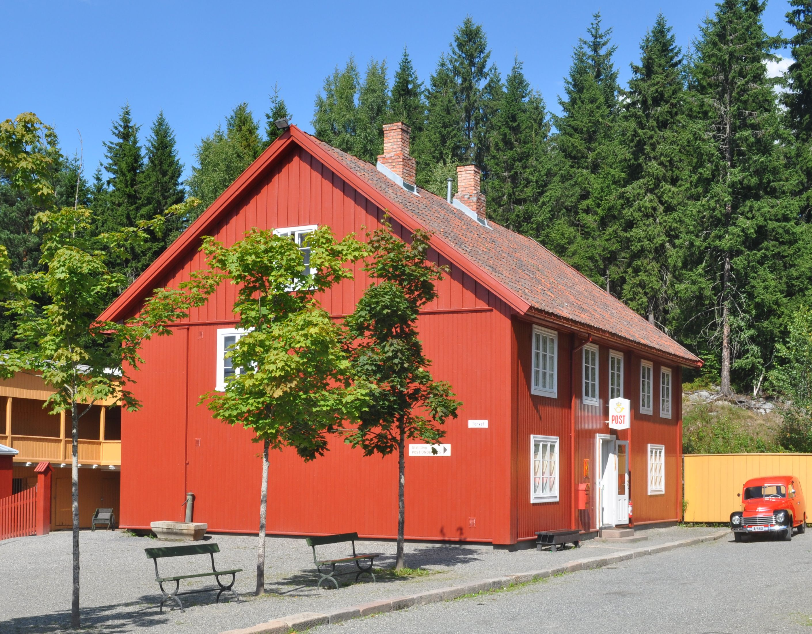 Postgården i Byen på Maihaugen museum, Lillehammer